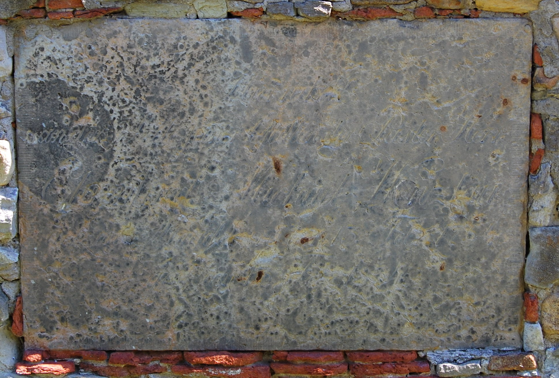 Grabplatte an der Westmauer des Turms des St. Stephanus Kirche in Magdeburg-Westerhüsen